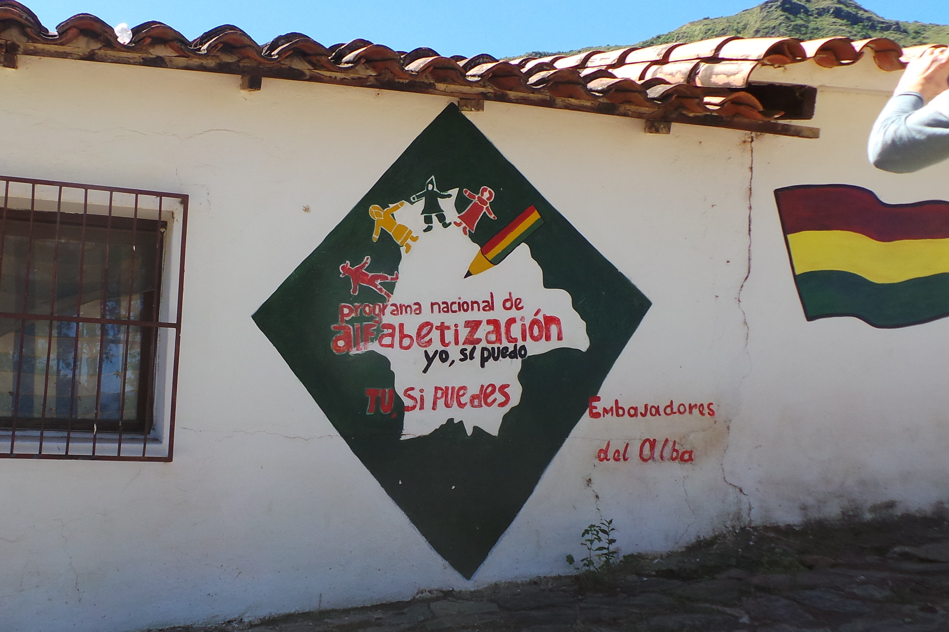 Mural homenaje al programa de alfabetización Yo si puedo en la plaza centra de La Higuera, Bolivia, comunidad en la que fue ejecutado Che Guevara y donde ahora se rinde homenaje al guerrillero.